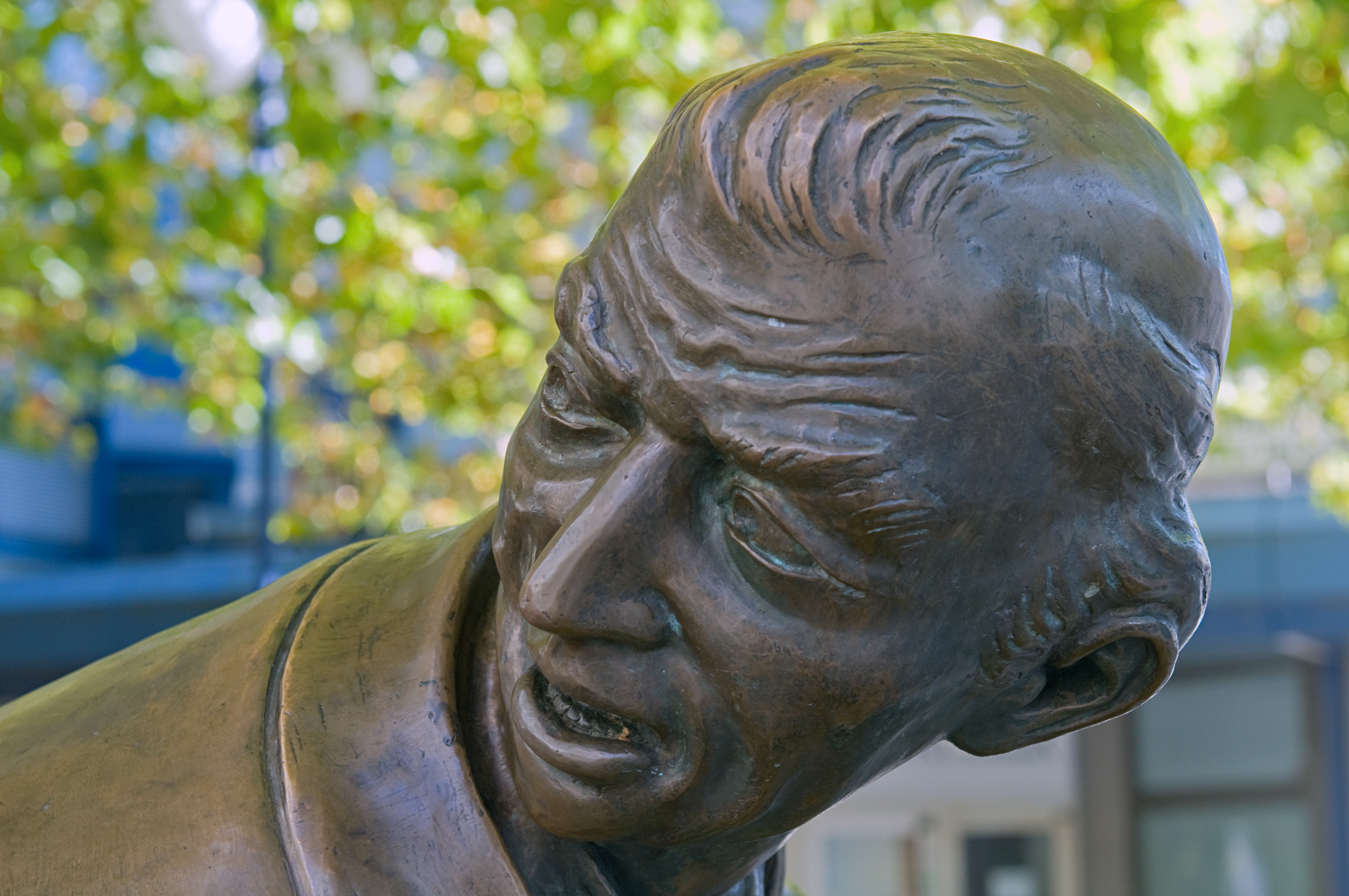 Krieh die Kränk, Offebach! Skulpturengruppe von Bonifatius Stirnberg in der Offenbacher Innenstadt, gestiftet von der Apotheke zum Löwen Detail: Mann